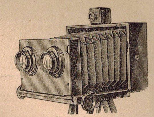 סטריאוסקופ